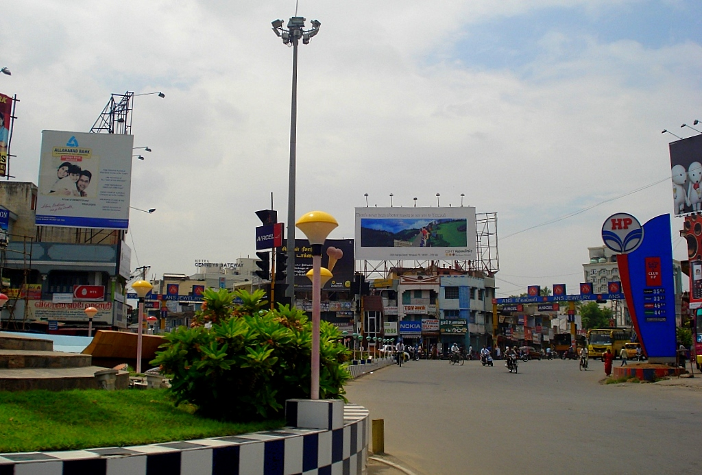 Five Roads Junction, Salem